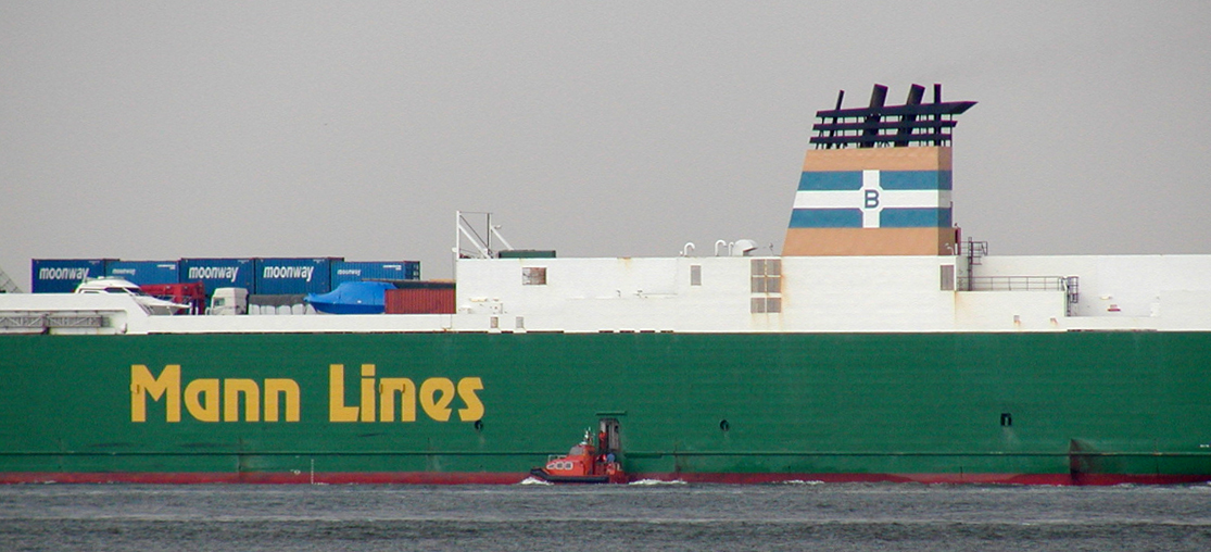 Ein Lotse wird von einem Schiff abgeholt